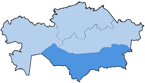 Mappa della diocesi di Almaty, in Kazakistan. Lavoro personale eseguito a partire da File:Kazakhstan provinces numbered english.png di Commons. Fonte per i confini delle diocesi: Guida delle missioni cattoliche 2005, a cura della Congregatio pro gentium evangelizatione, Roma, Urbaniana University Press, 2005.